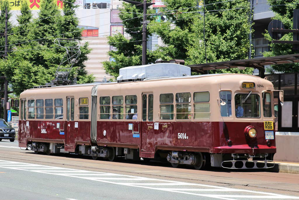 復活後の姿。上半分の色が薄くなり福岡市内線時代のカラーに。